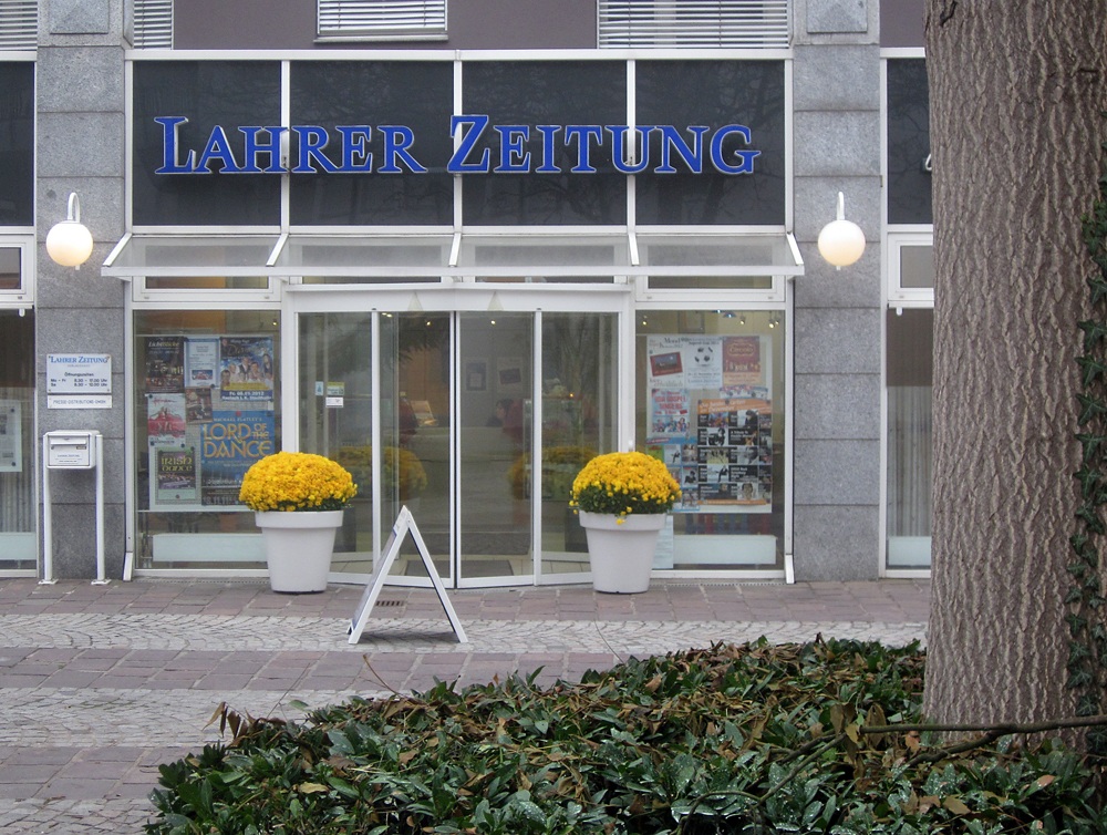 Blick auf die Geschäftsstelle der Lahrer Zeitung in Lahr.